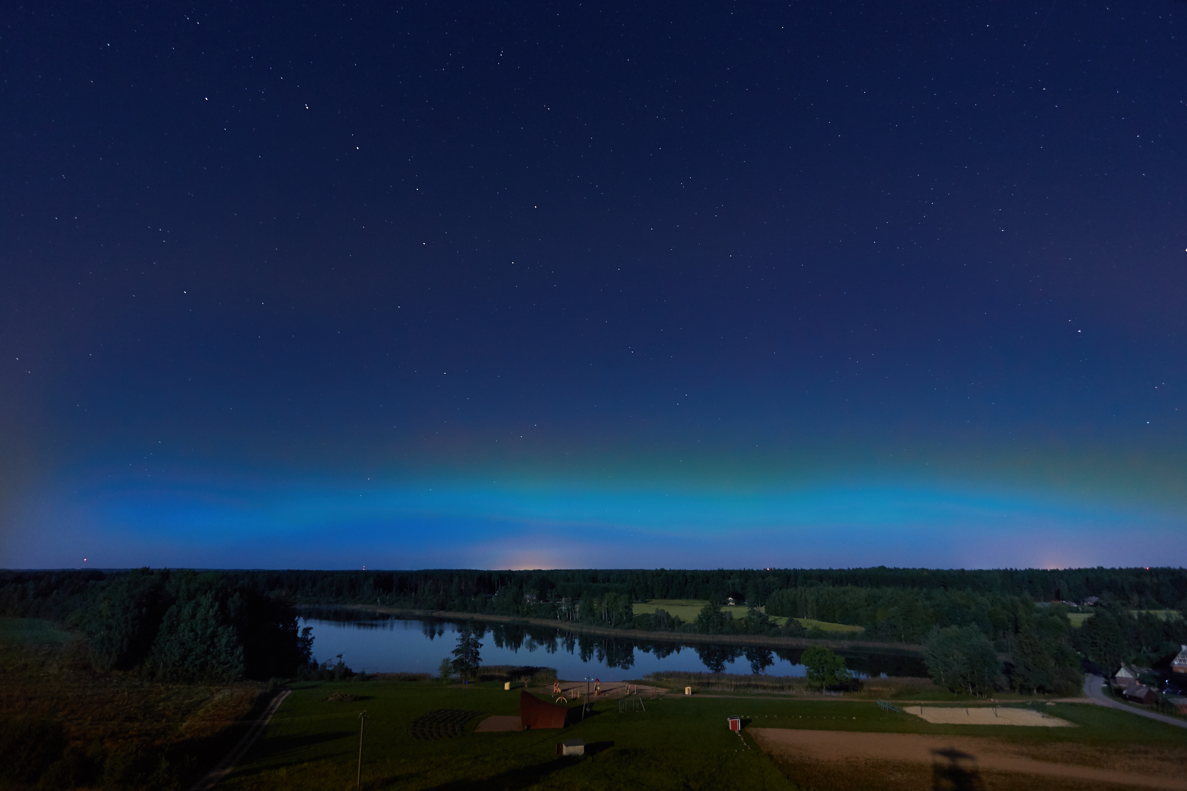 Virmaliste kuma Tilsi Kõrbjärve kohal